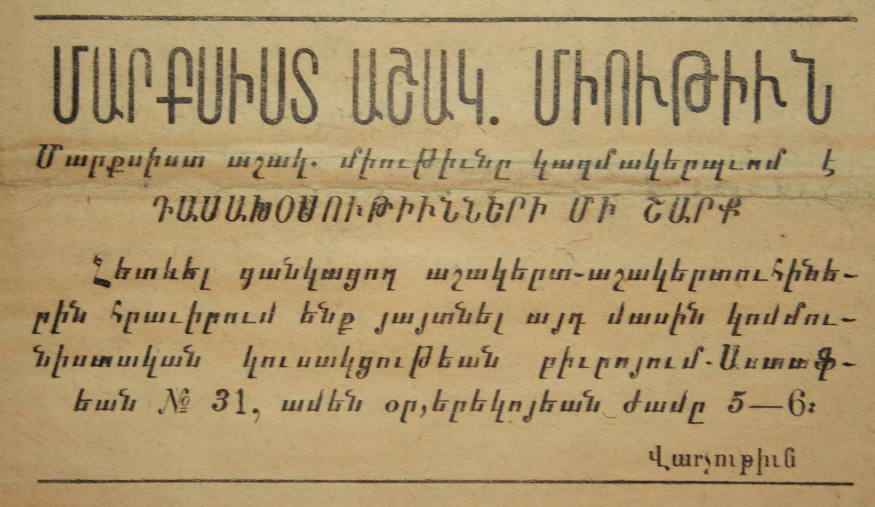 Մարքսիստ աշակերտների միության կազմակերպած դասախոսությունների մասին հայտարարություն, Խոսք, № 6, 1918